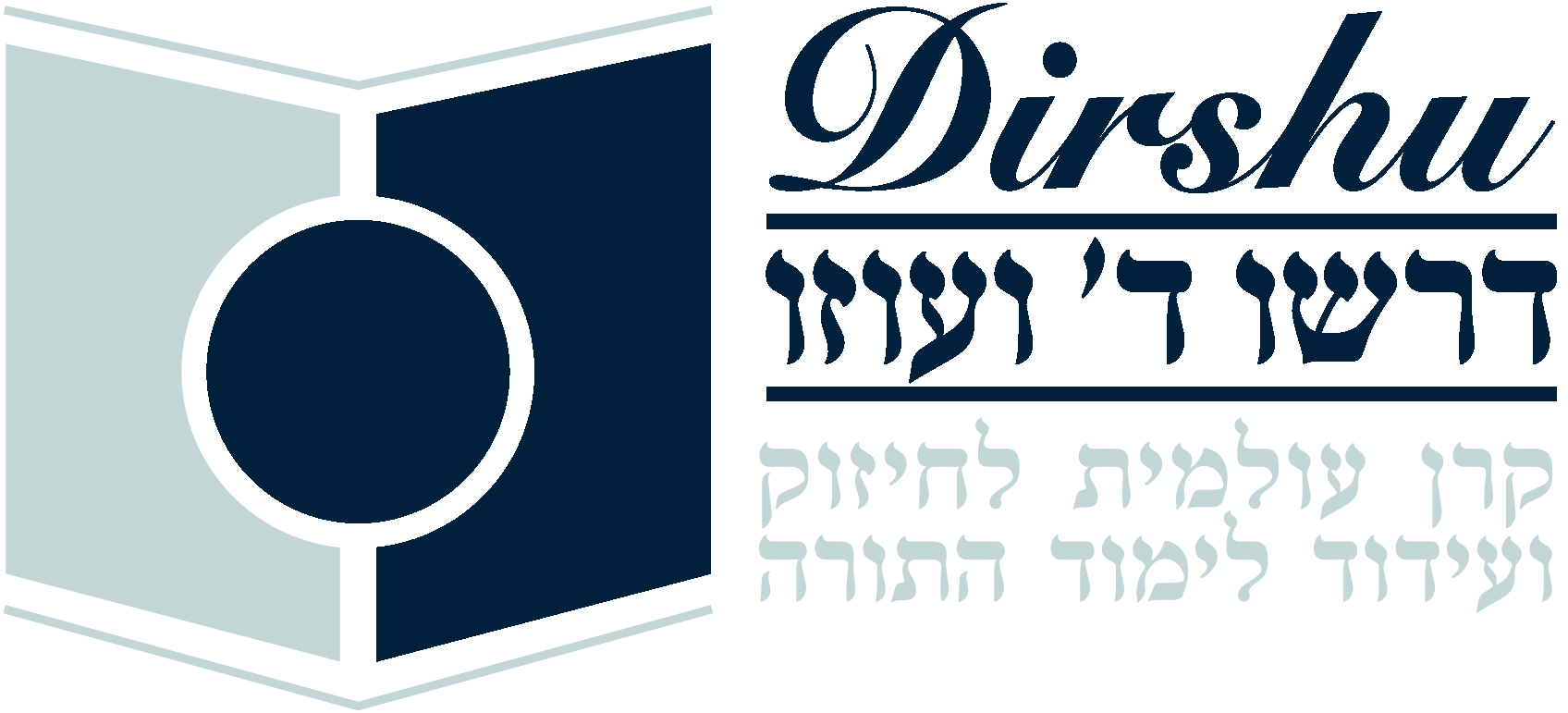 לוגו ארגון דרשו עברית/אנגלית